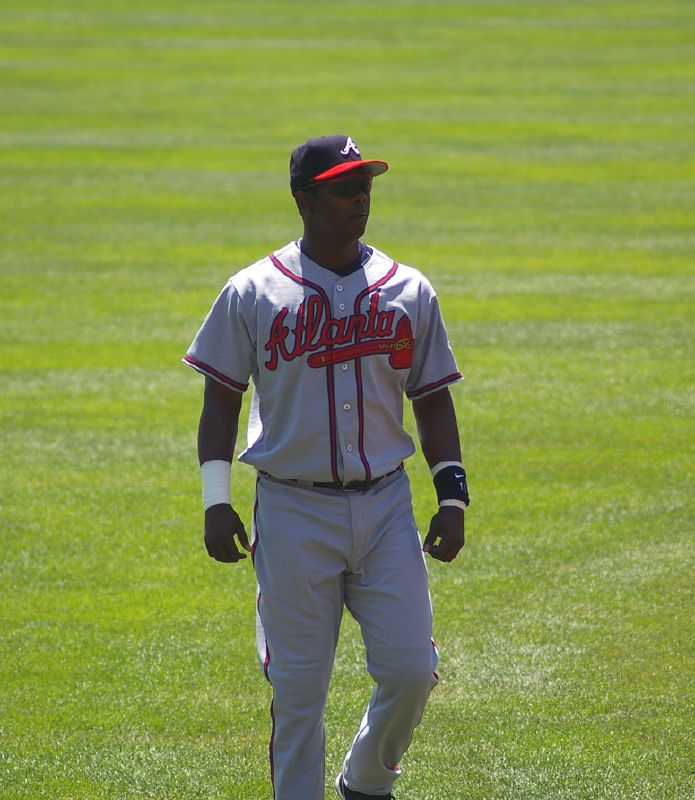 during warmups